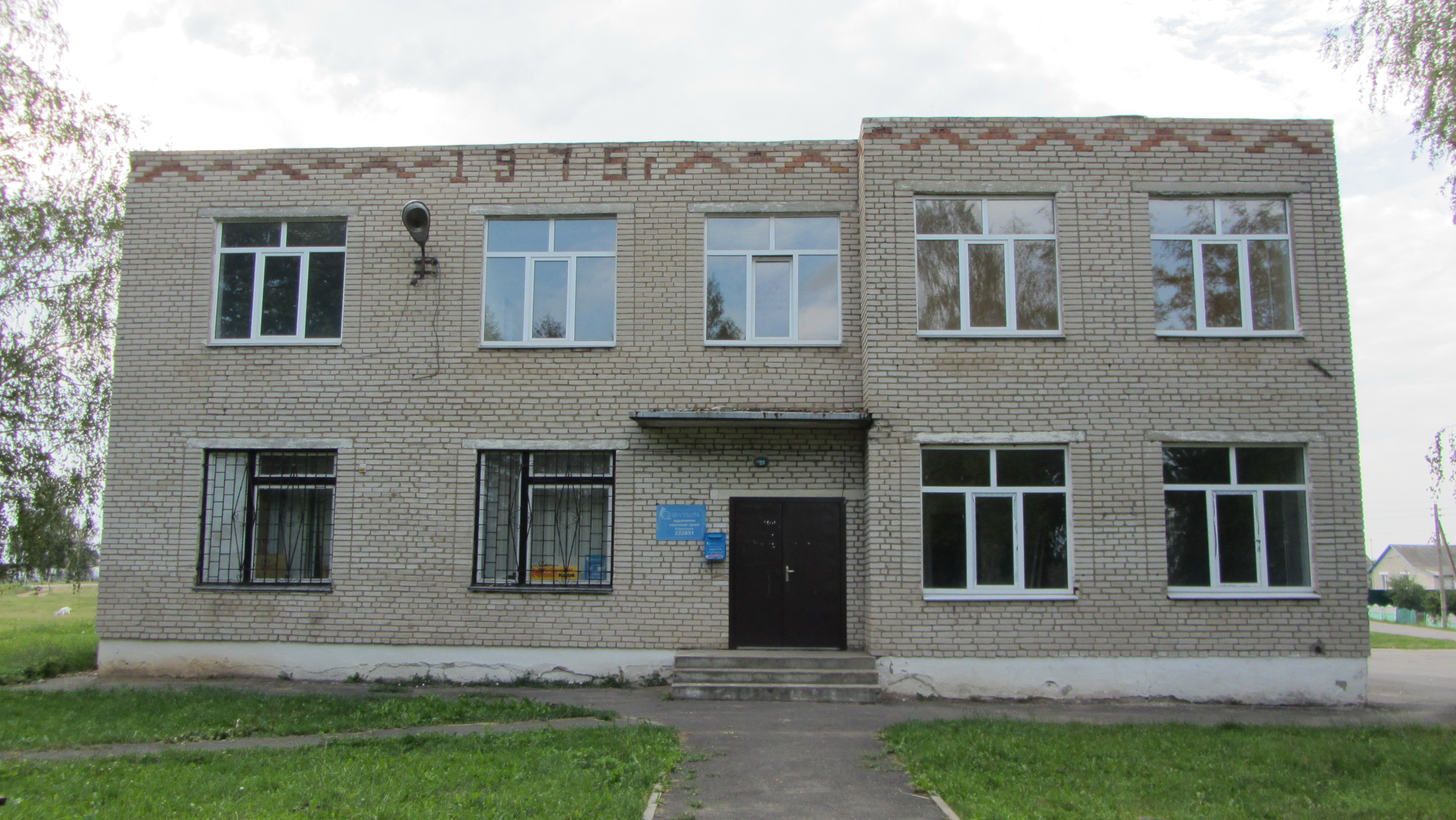 Азярычына, паштовае аддзяленне.